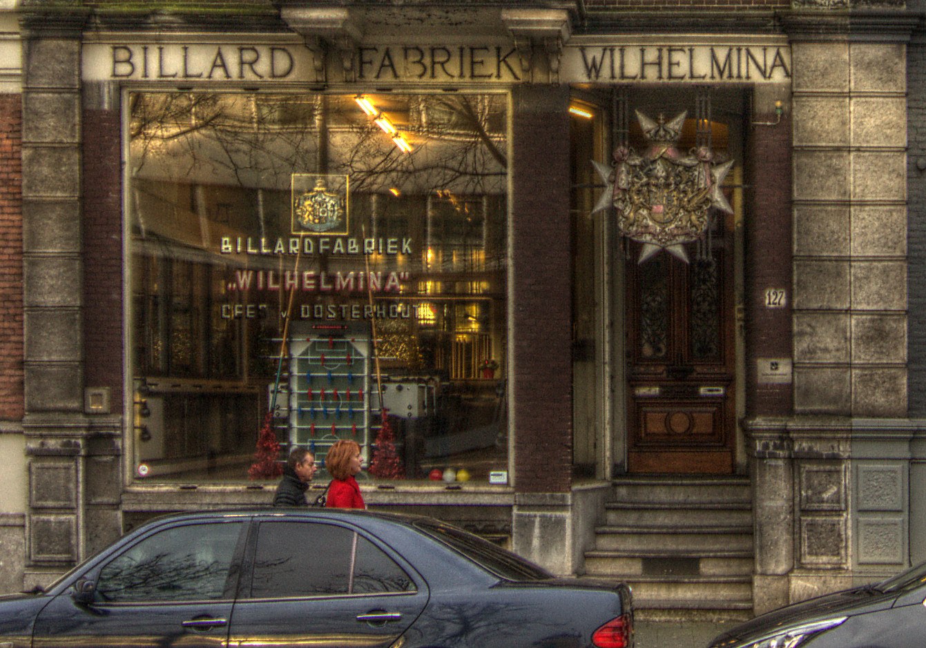 Biljartfabriek "Wilhelmina" op de Stadhouderskade 127